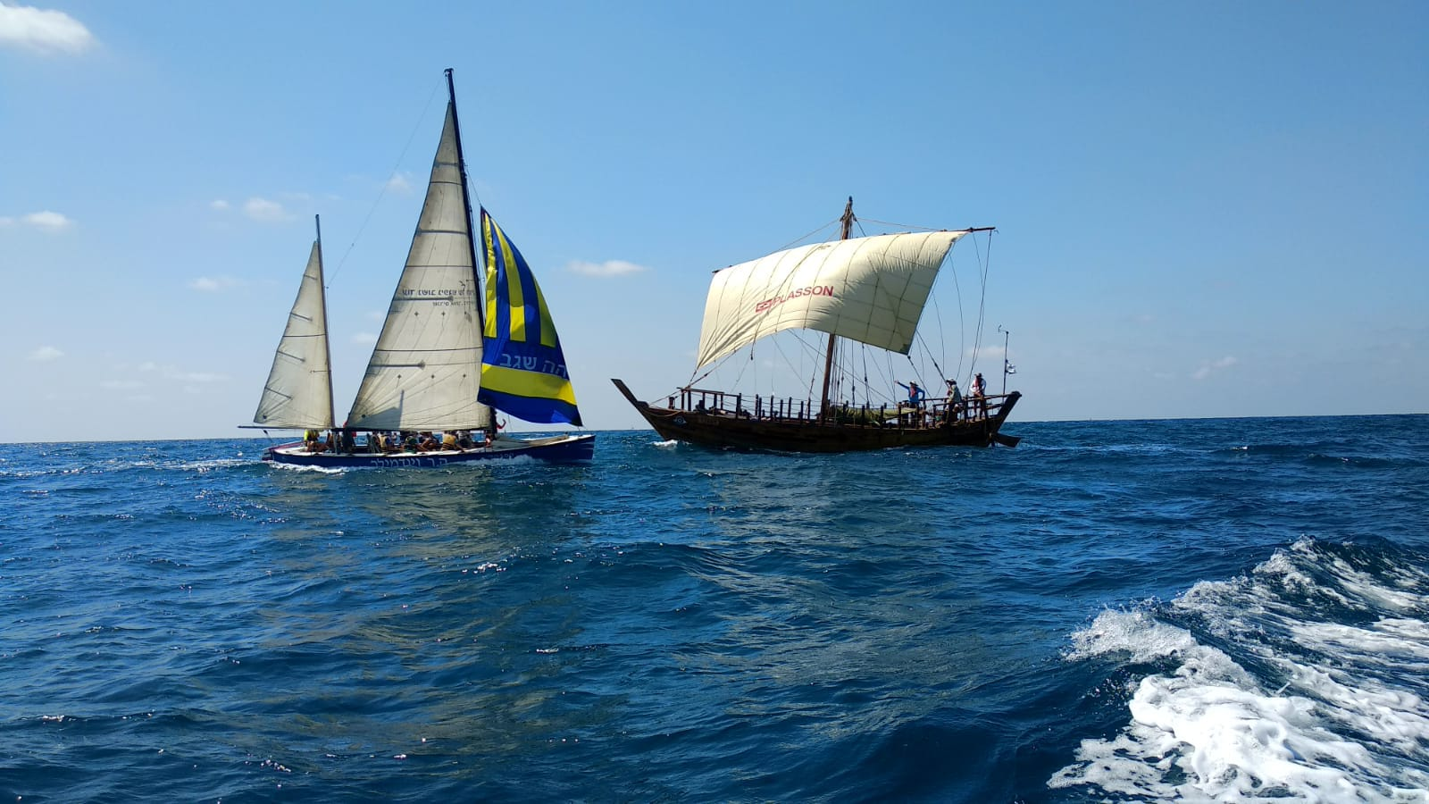 הספינה "מעגן מיכאל II" אל מול הספינה "ה.ר. וינדמילר" של שבט צופי-הים חיפה